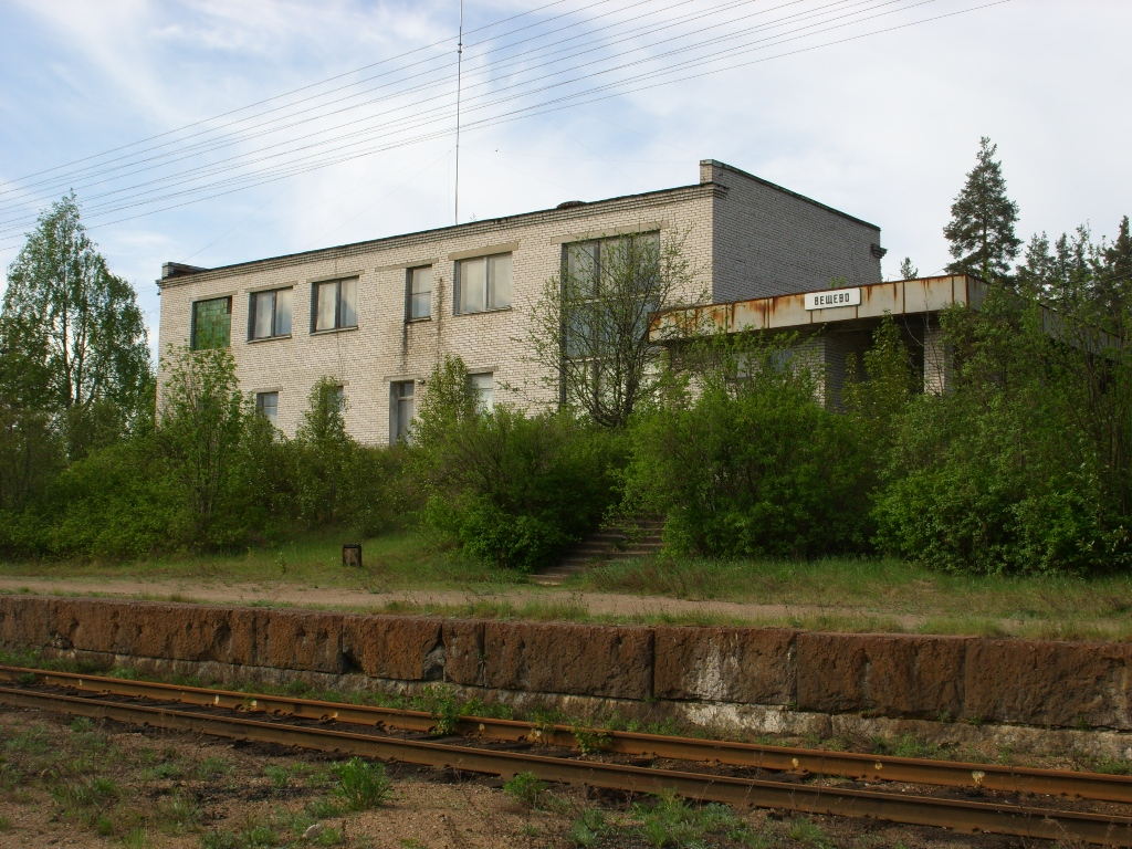 Вокзал ст. Вещево, Лен.обл.